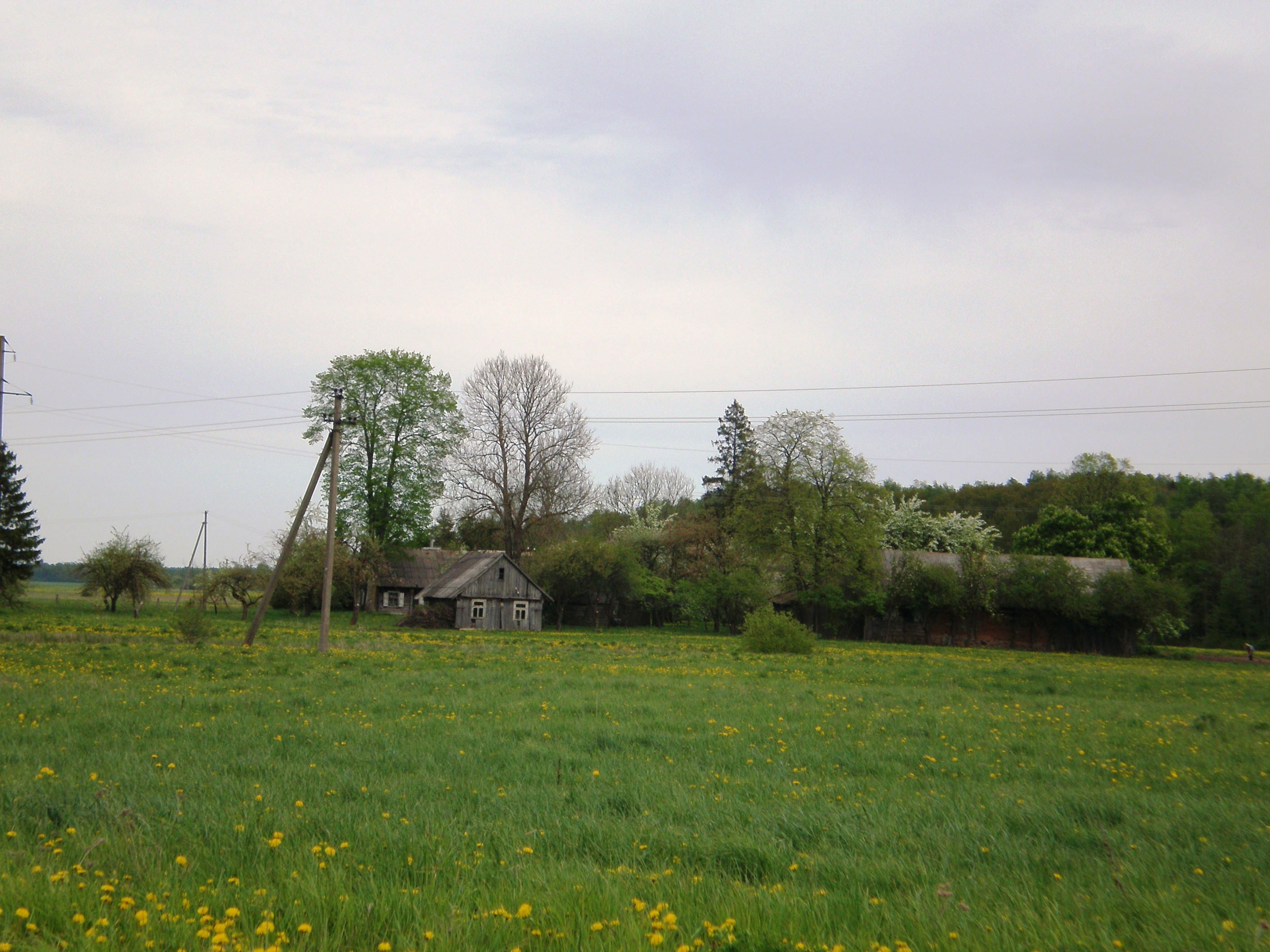 Antušava, Gudžiūnų sen., Kėdainių raj.